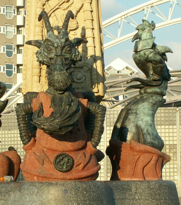 Sculpture (detail) "Hommage aan Marten Toonder"in Rotterdam/The Netherlands